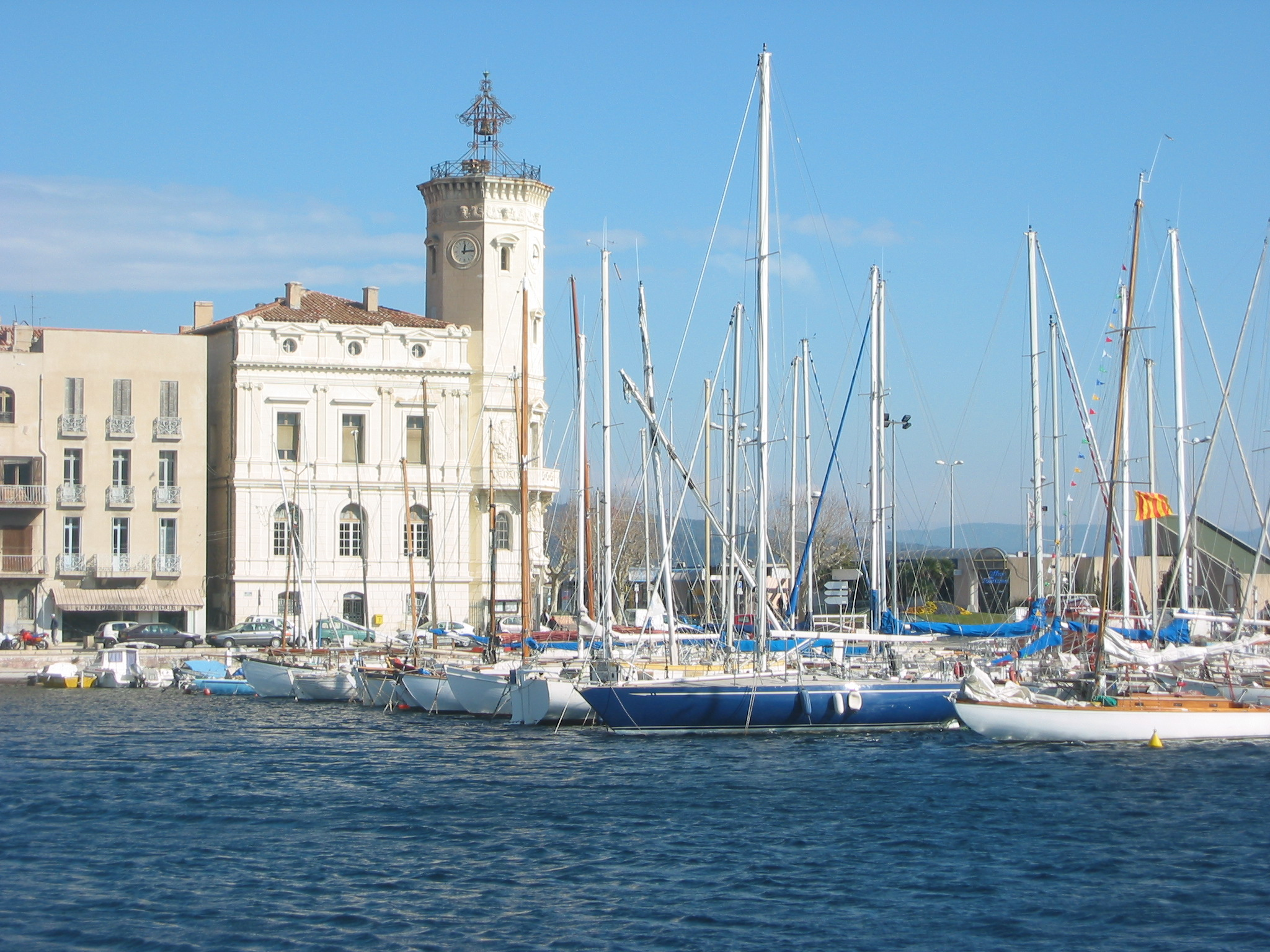 Port de La Ciotat, Bouches-du-Rhône, France. En arrière plan, Clocher de style renaissance de l'ancien hôtel de ville.